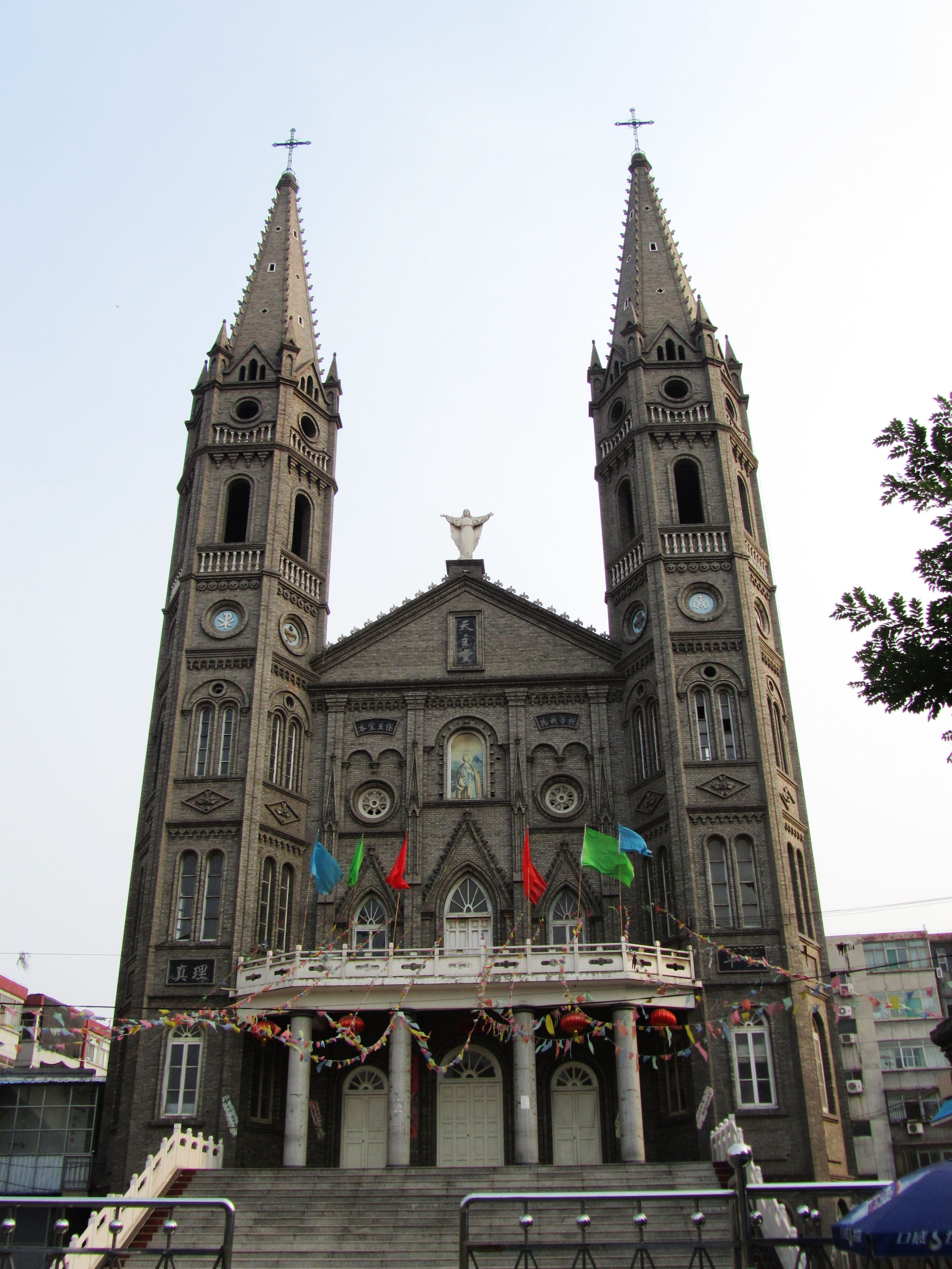 洪洞主教座堂，北立面。